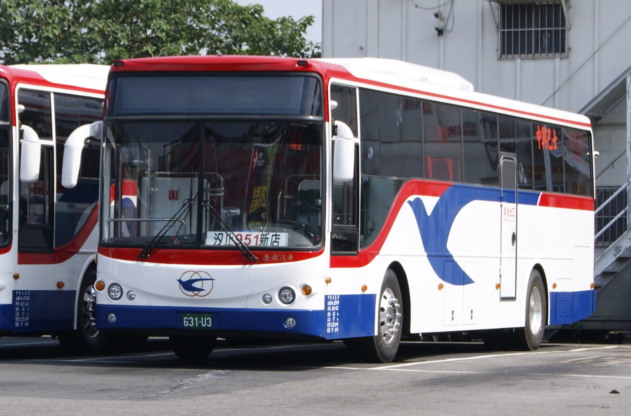 中興巴士2014年KINGLONG KL6120UH5無司機門大客車631-U3。